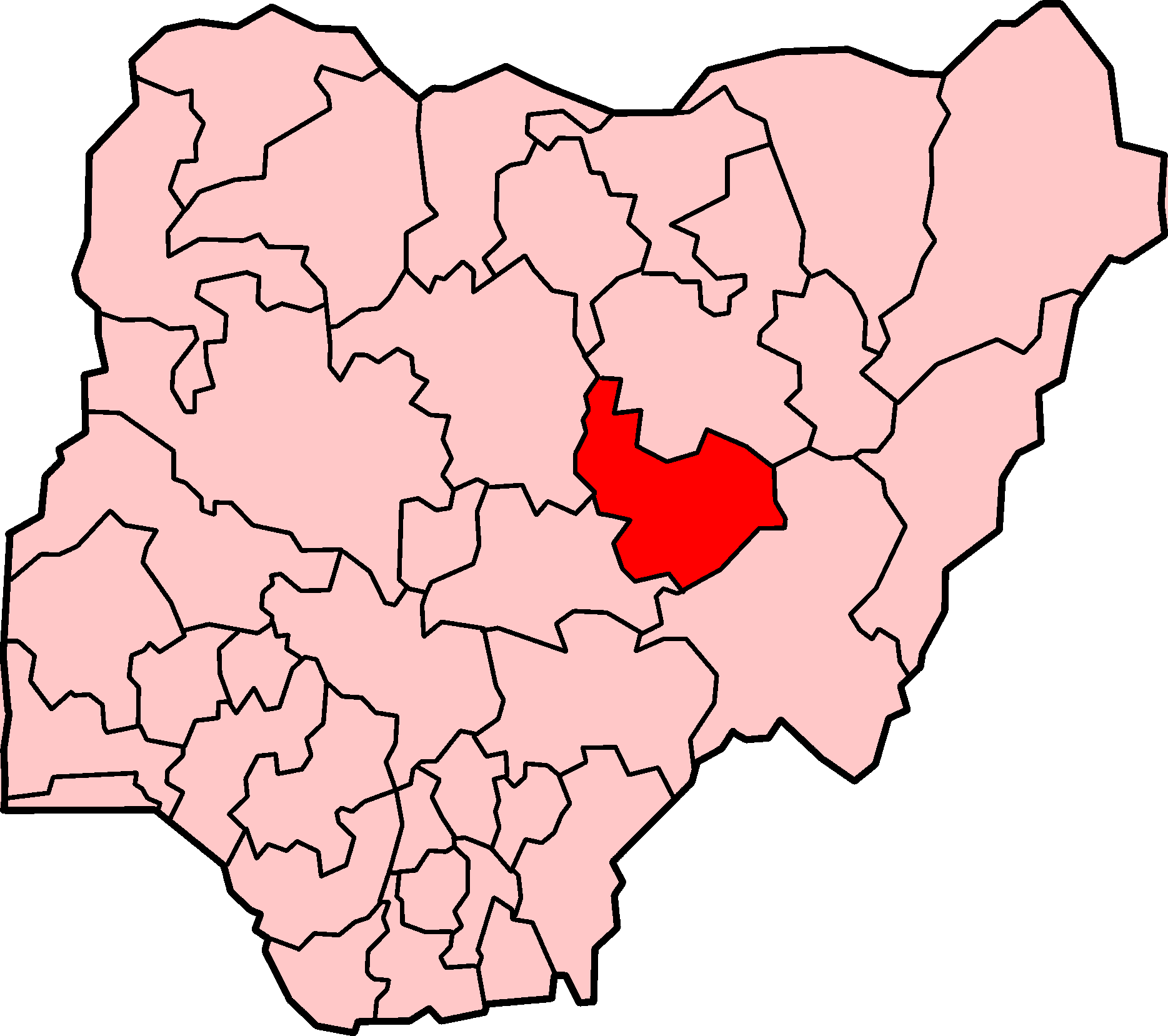 Localização do estado de Plateau na Nigéria.